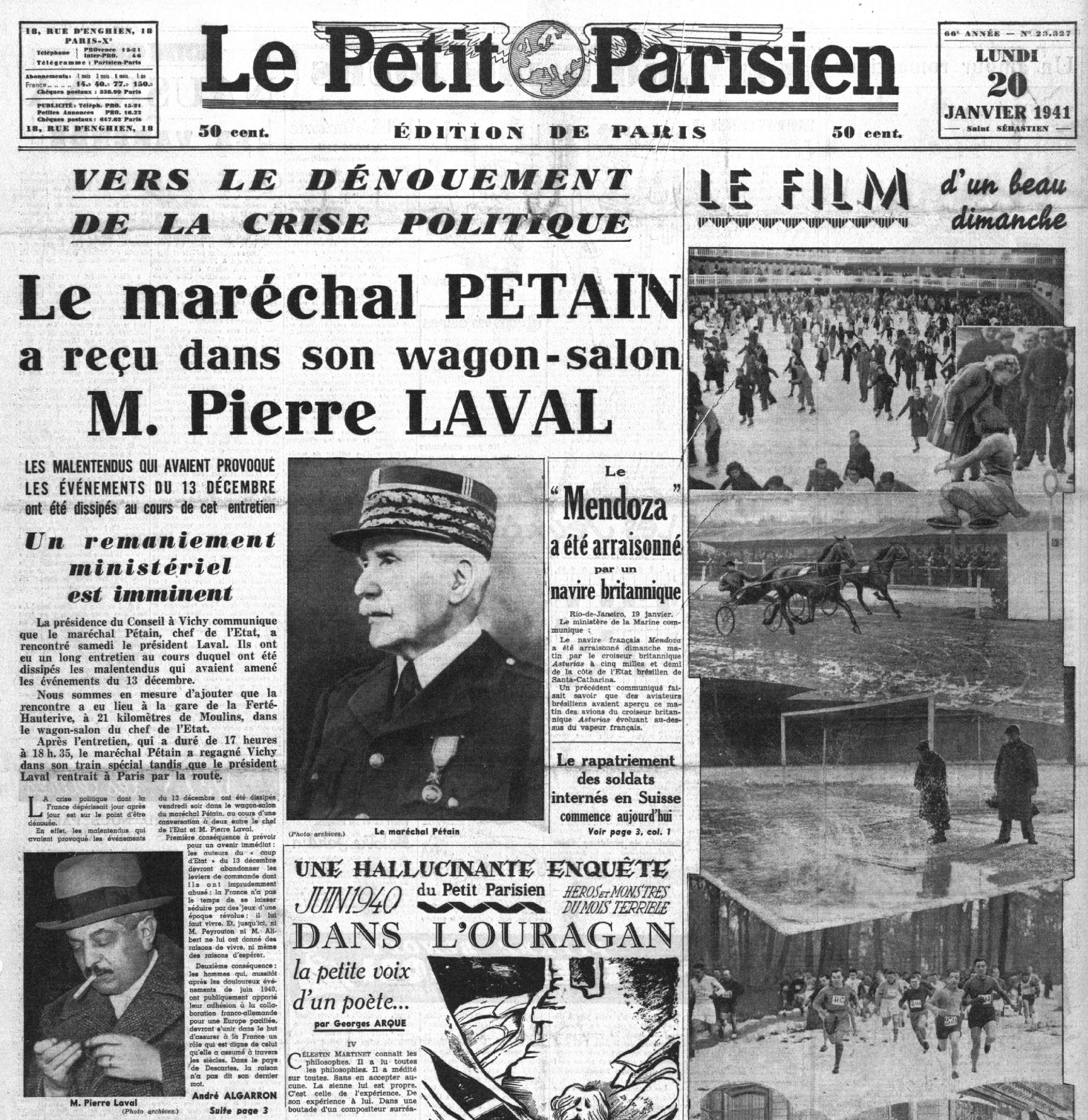 Le journal Le Petit Parisien évoque une rencontre entre Philippe Pétain et Pierre Laval après le renvoi de celui-ci lors de « la crise politique » du 13 décembre 1940. Le Petit Parisien, 20 janvier 1941.